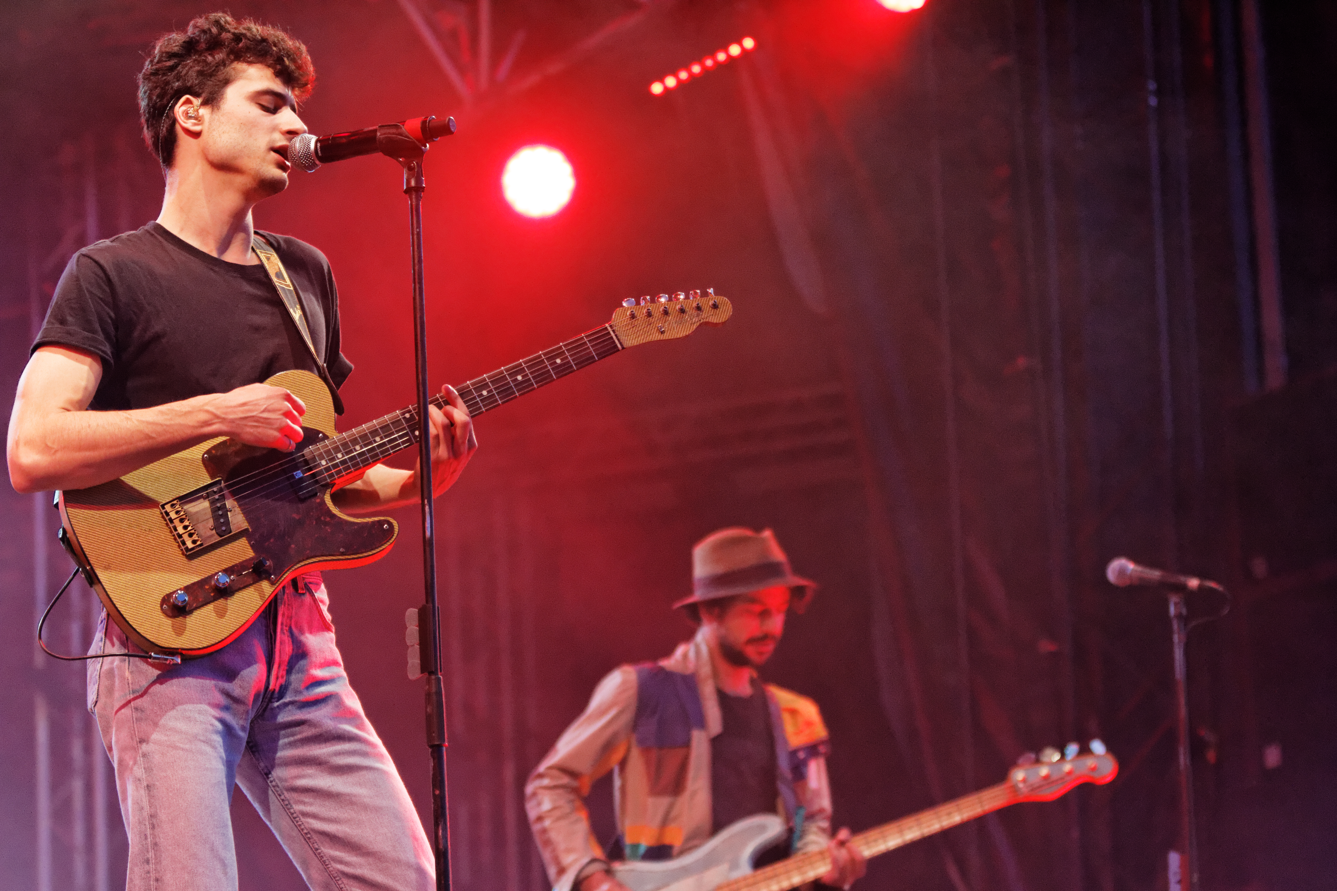 BB Brunes en concert sur la scène Grall lors du festival des Vieilles Charrues 2014.